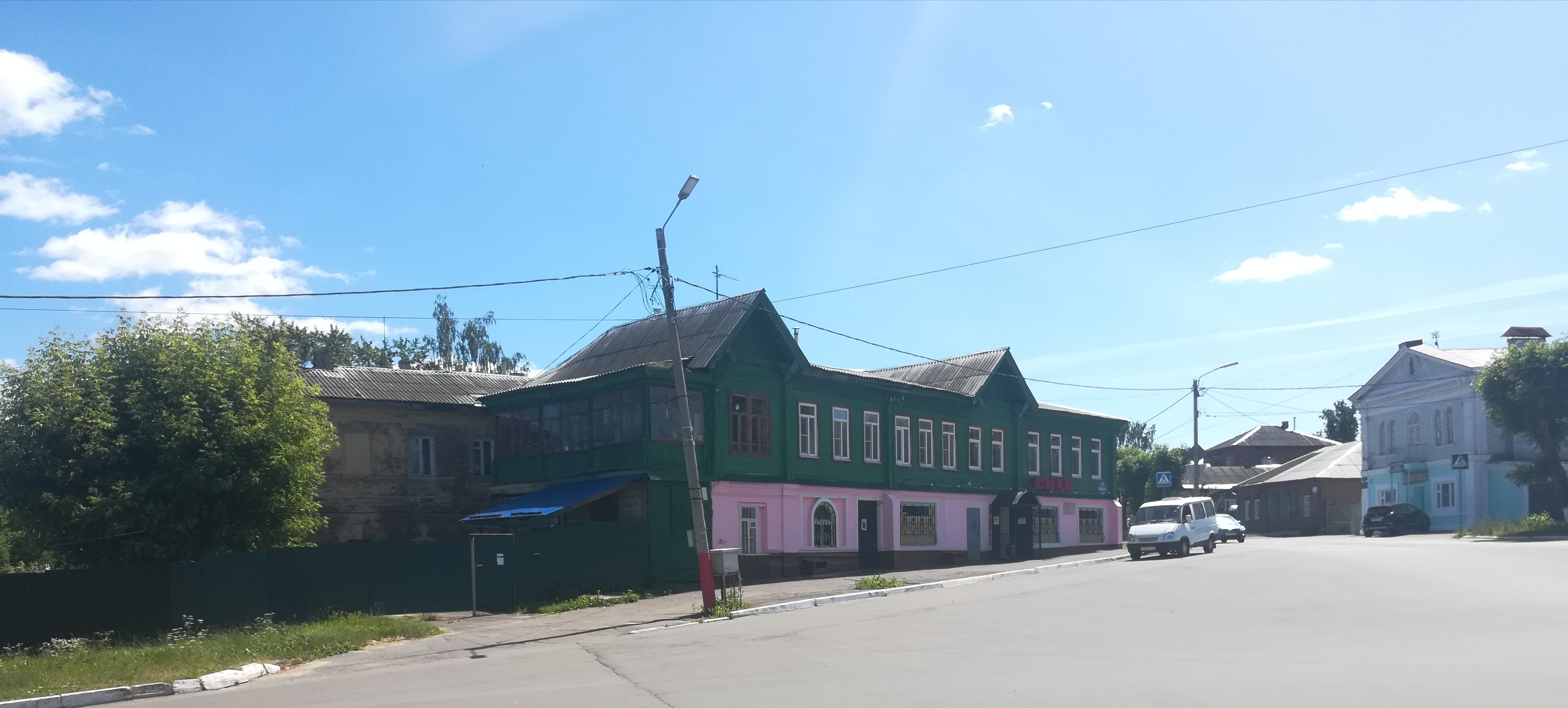 Муром